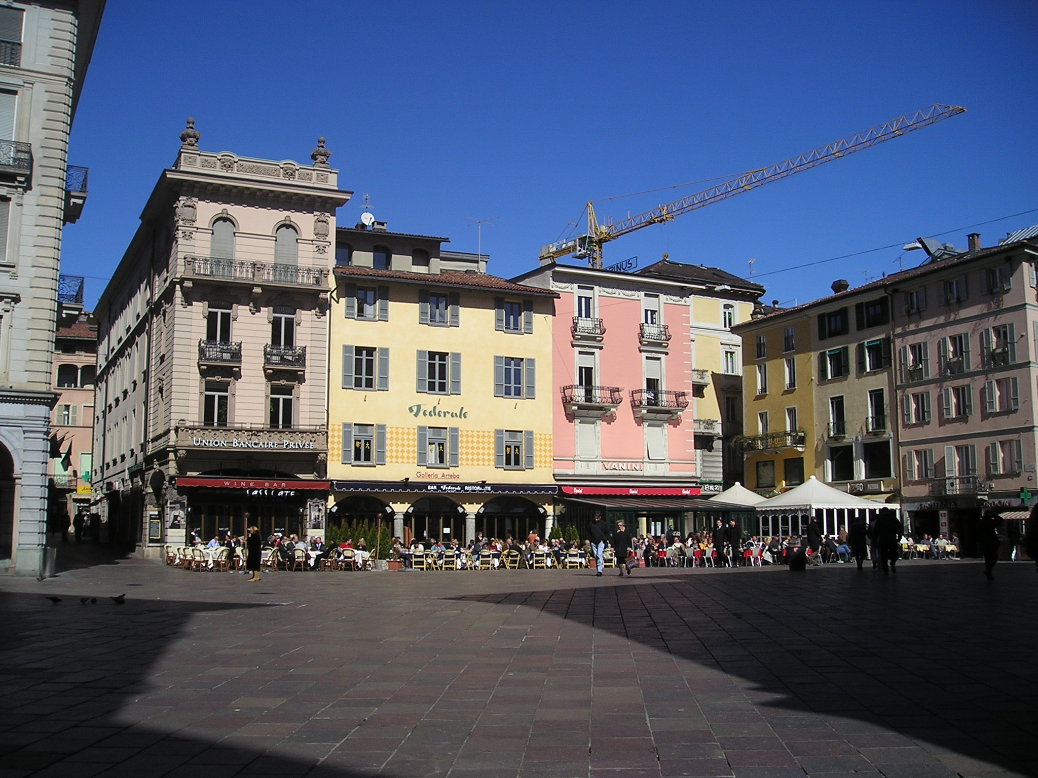 Piazza Riforma, Massimo Macconi